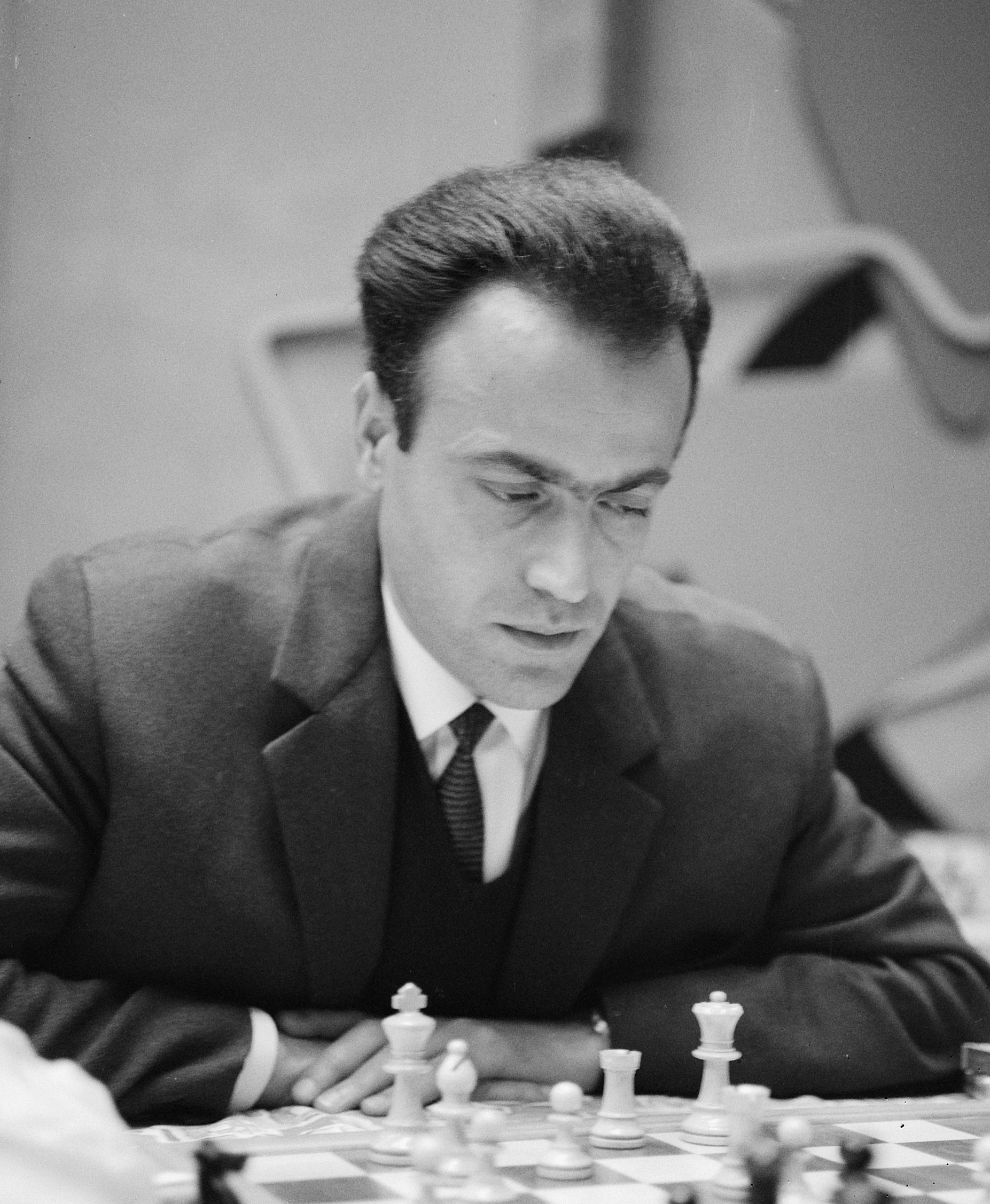 Hoogovenschaaktoernooi, M. G. Bobotsov (Bulgarije)